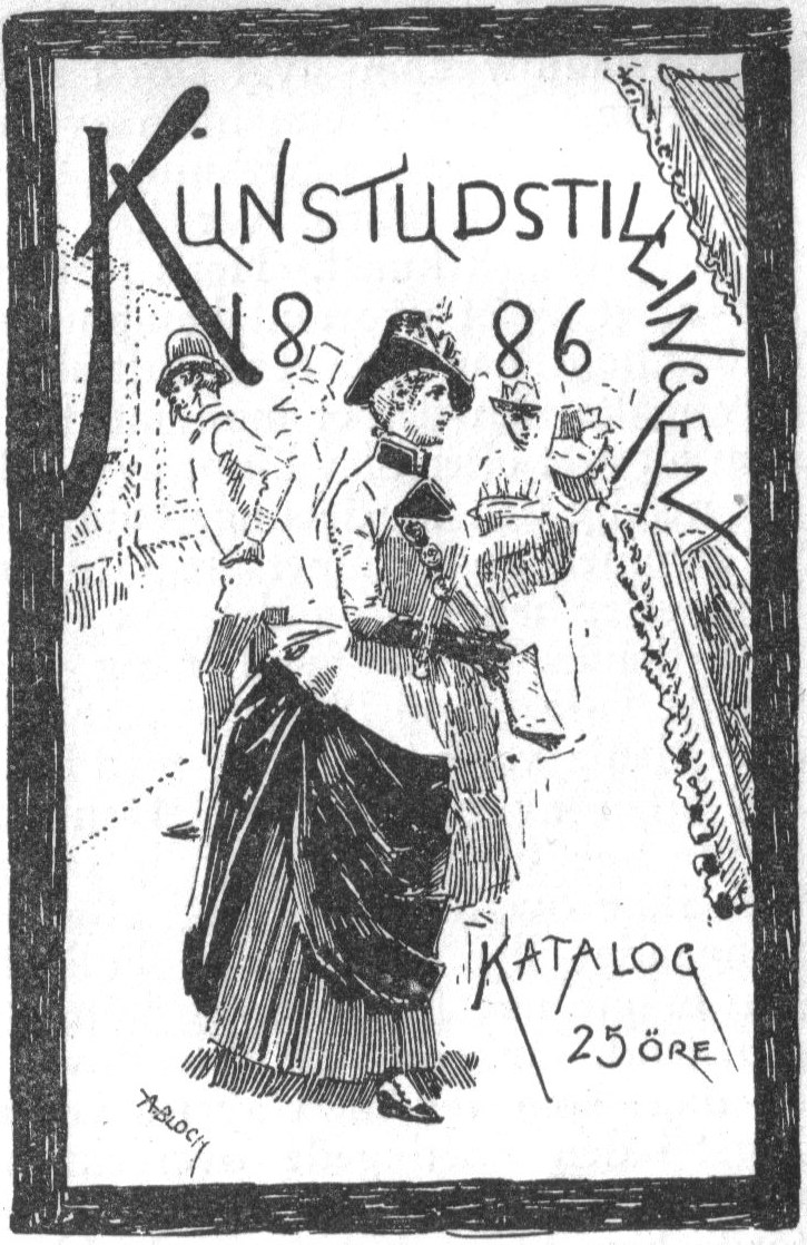 Omslag til katalogen for Statens kunstutstilling i 1886. Tegning av Andreas Bloch